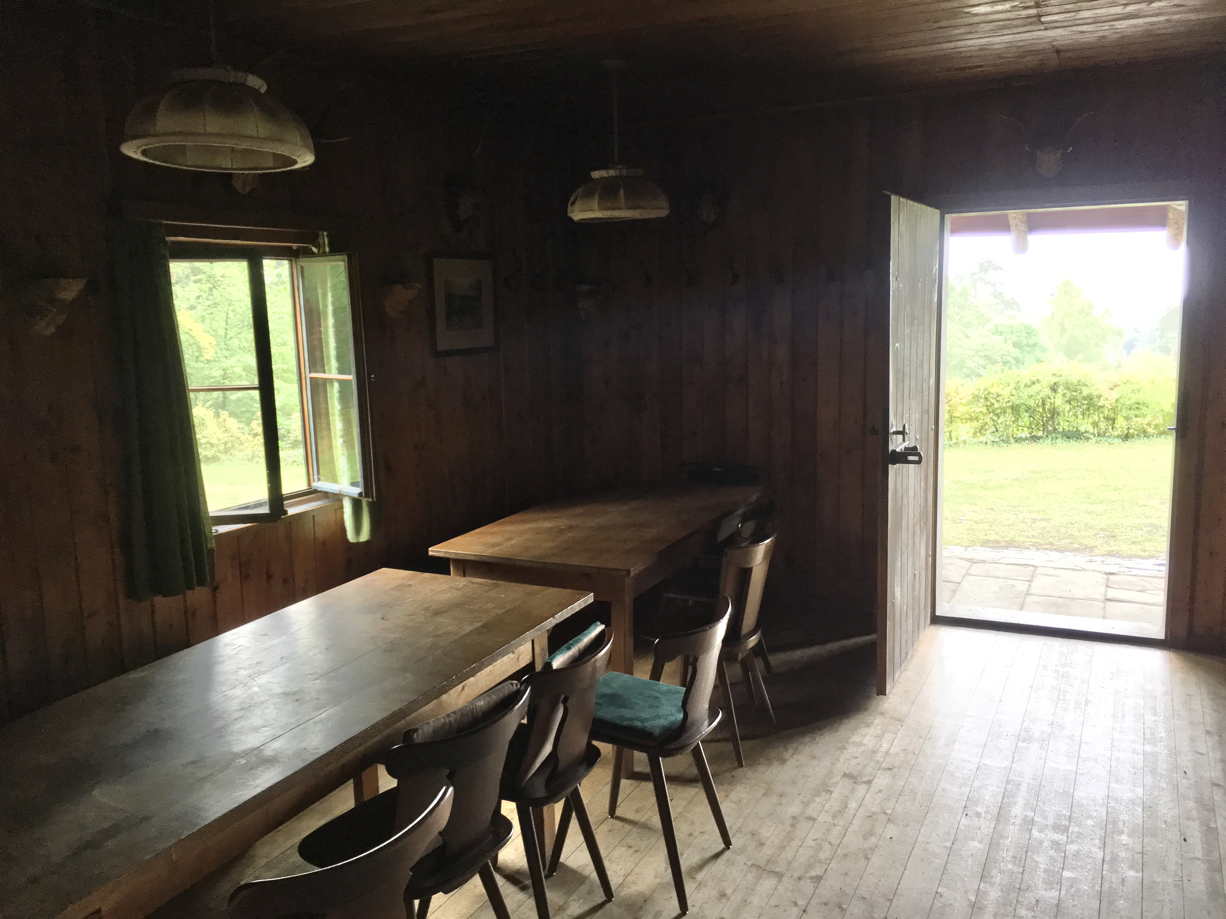 Der sehr einfach ausgestattete Innenraum der Königlichen Jagdhütte im Schönbuch. Foto während der Besichtigung am des Tag des offenen Denkmals.